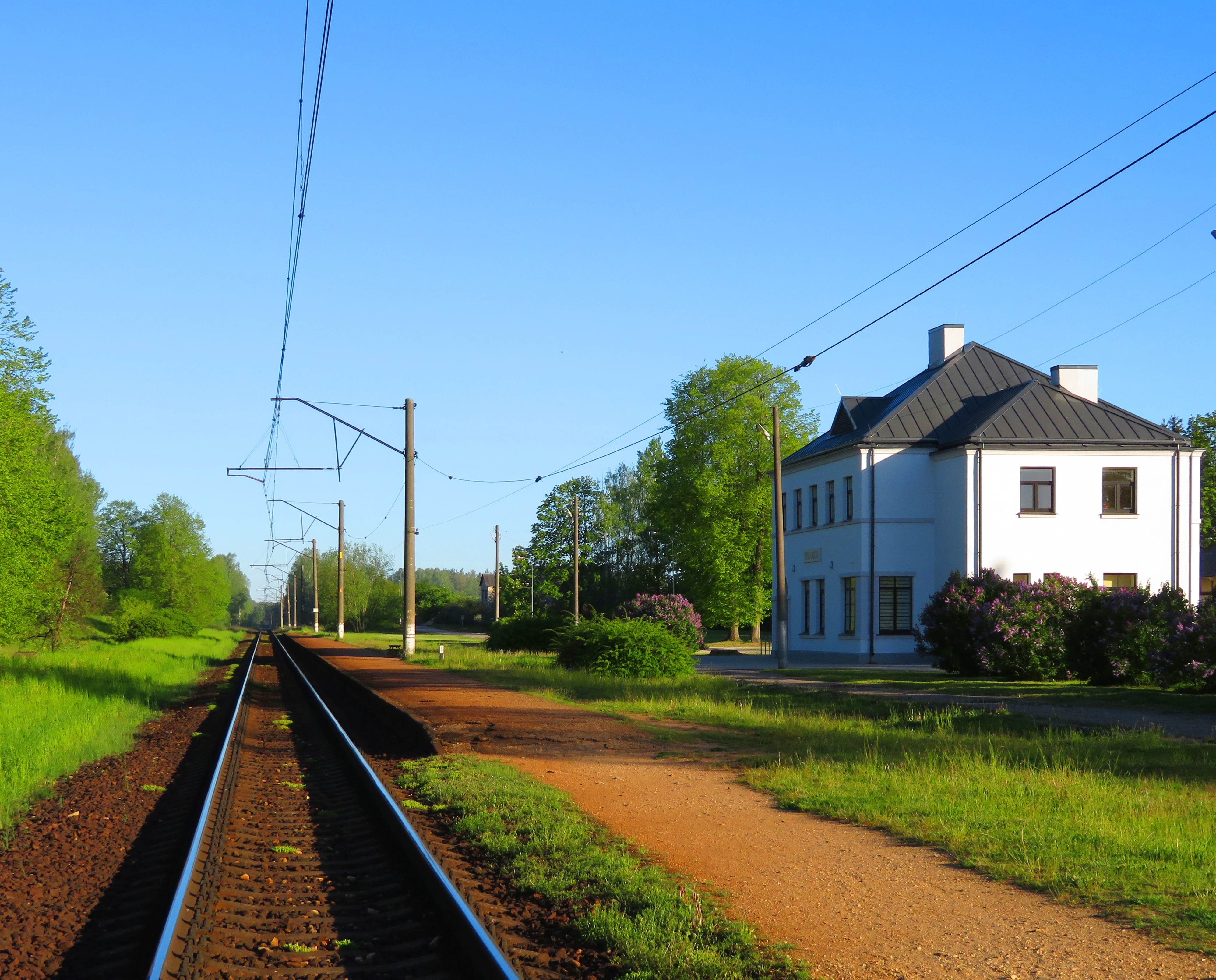 Smārdes stacija, skats Tukuma virzienā